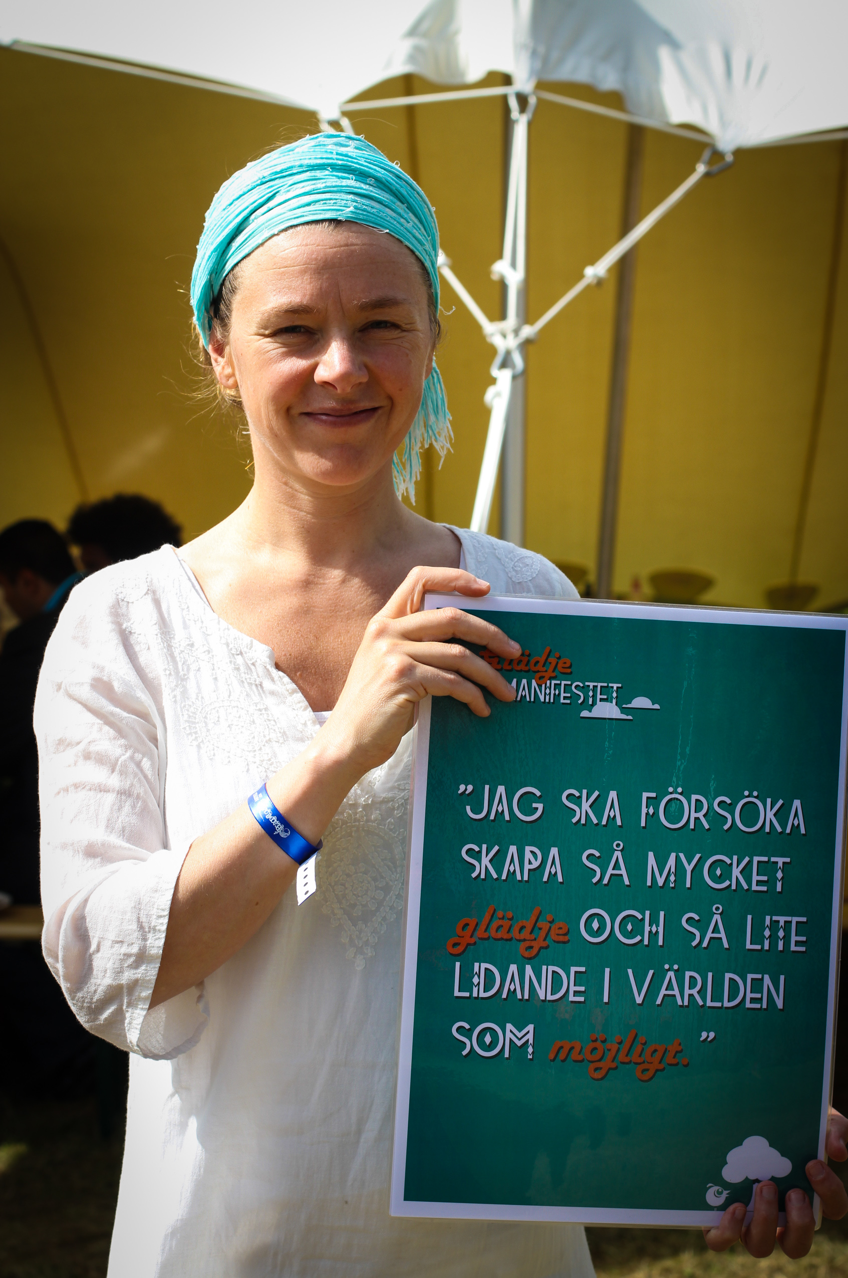 F.d. fotbollsspelaren Tina Nordlund, numera Tina Lovesan.